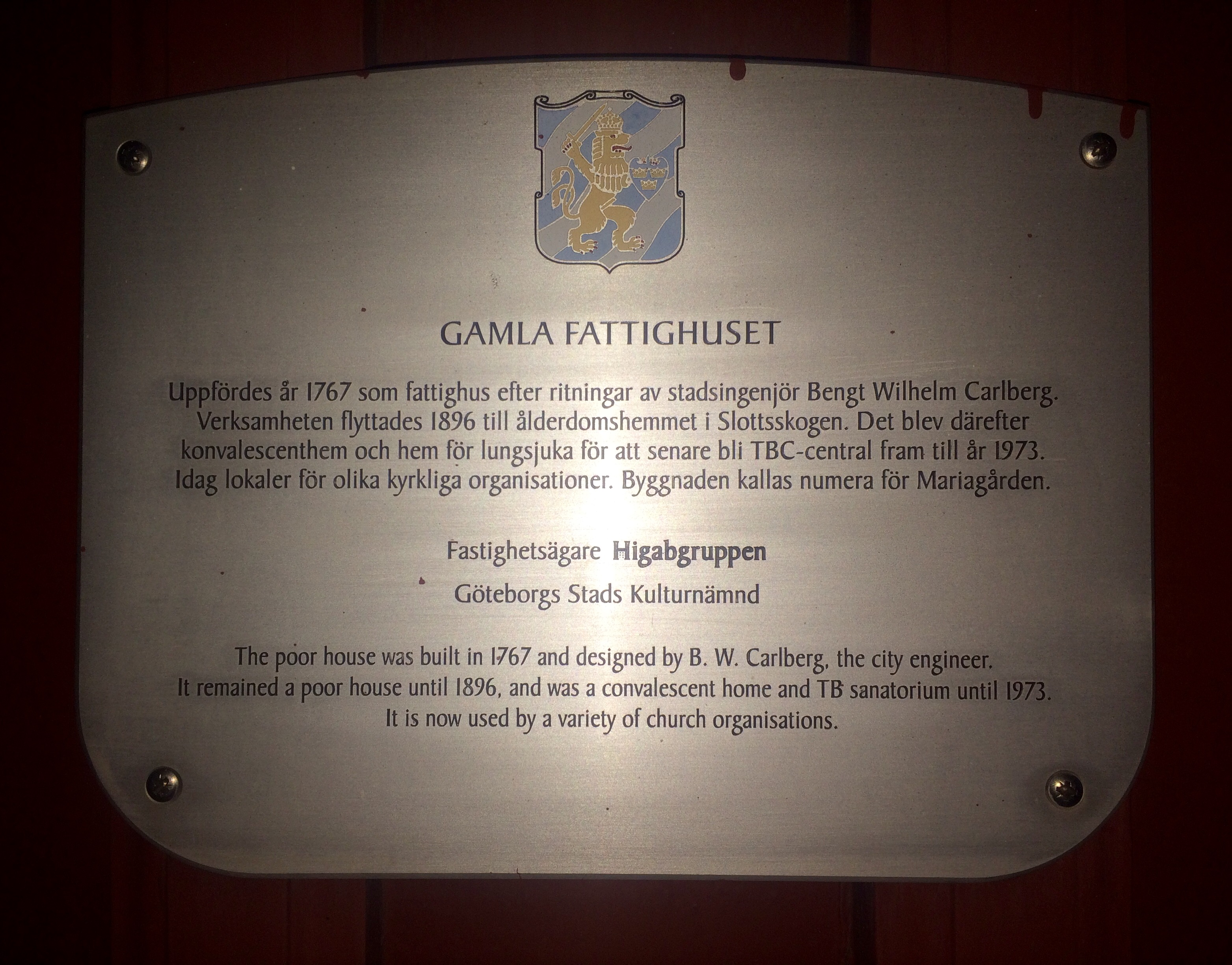 Informationsplakett om Gamla fattighuset (Mariagården) vid Lilla Stampgatan 1B i Göteborg, uppsatt bredvid entrédörren. Plaketten uppsattes som en del av Göteborgs stads kulturnämnds "Projekt Husmärkning" kring år 2000/2001 där drygt hundra skyltar ingick (ca 10 skyltar per månad). Se även boken "100 utmärkta hus i Göteborg". Vid en inventering av kommunen gjord 2016 satt 69 skyltar fortfarande uppe.